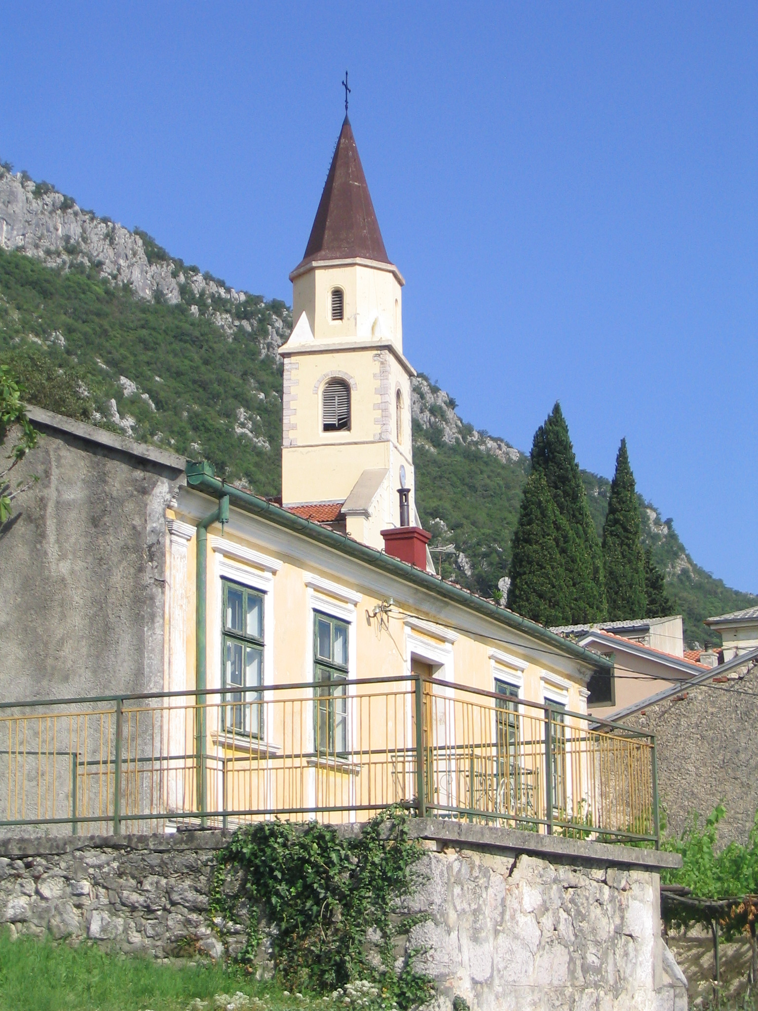 Grižane, Croatia